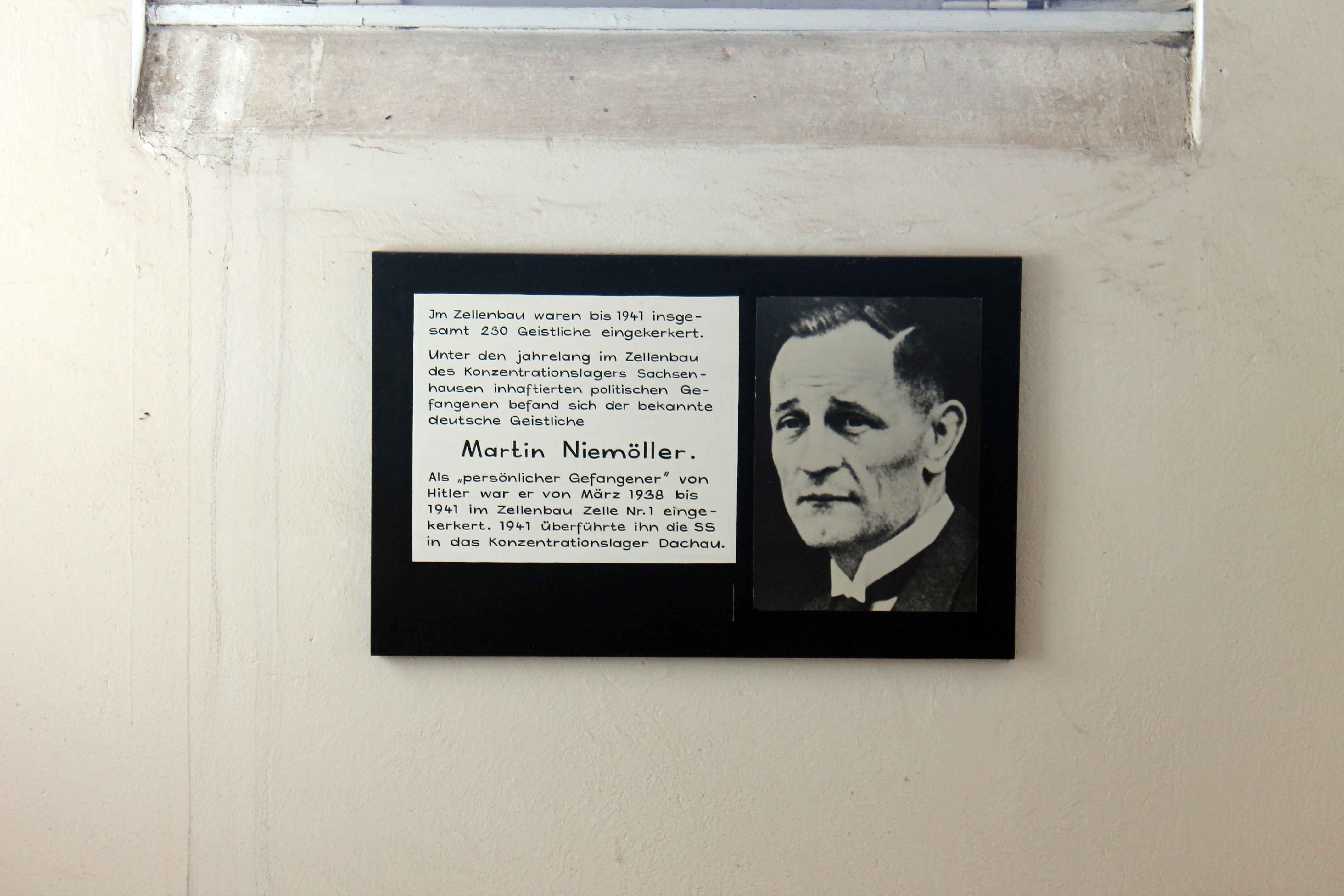 Bild von Martin Niemöller im KZ Sachsenhausen ausgestellt im Zellenbau direkt in einer Zelle.